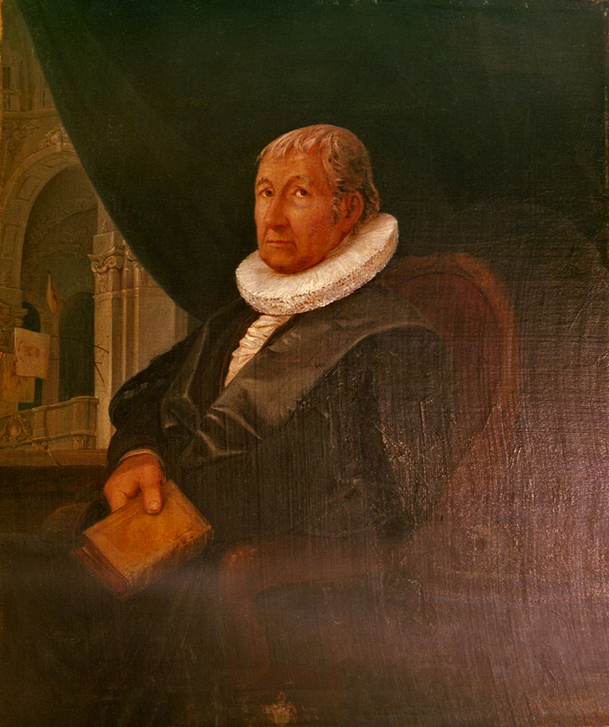 Porträt (posthum) Carsten Wilhelm Soltau (Vater des Künstlers). Maire-Adjoint (Stellvertretender Bürgermeister) von Hamburg in der Hamburger Franzosenzeit.